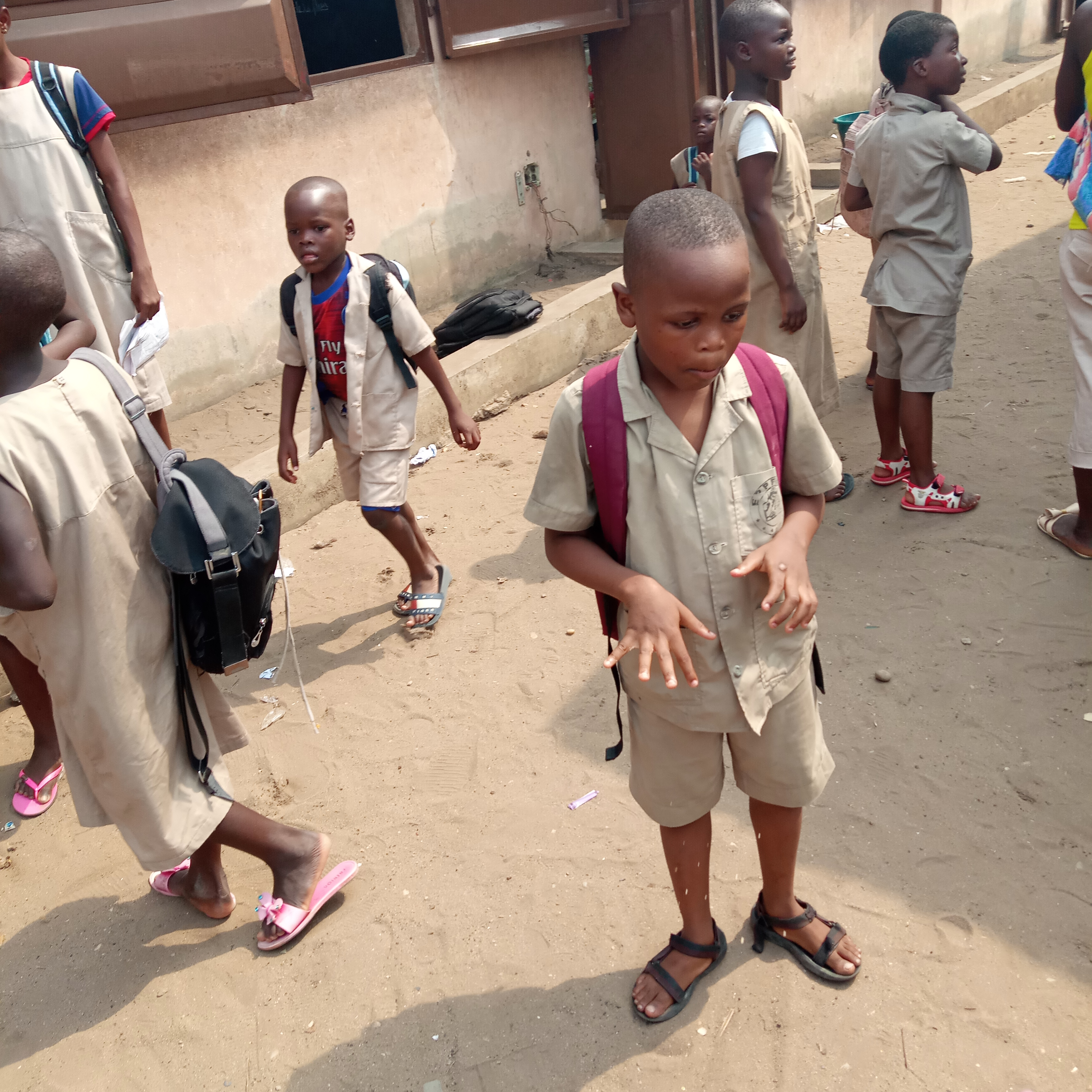 Ecolier EPP Savi (Godomey)